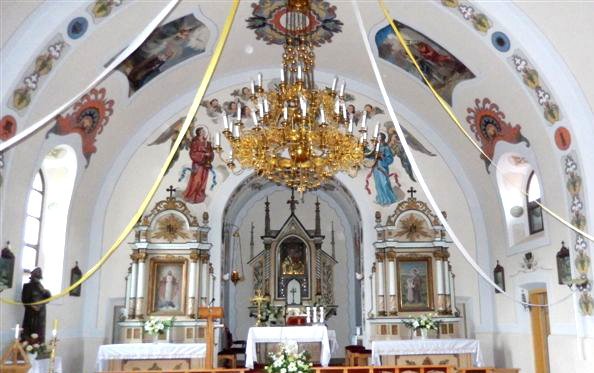 brusno_nove_kostel